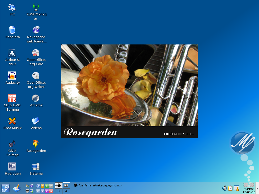 Musix Linux 1.0 R4